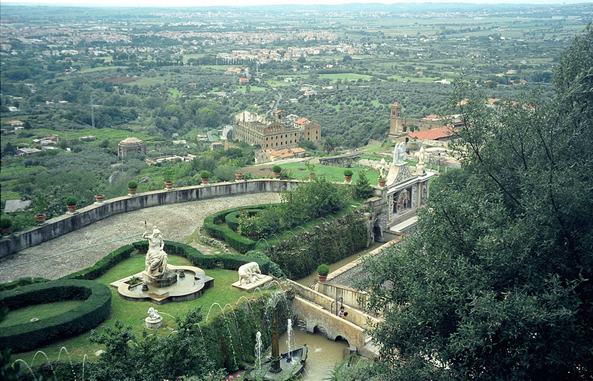 Villa d'Este, Tivoli